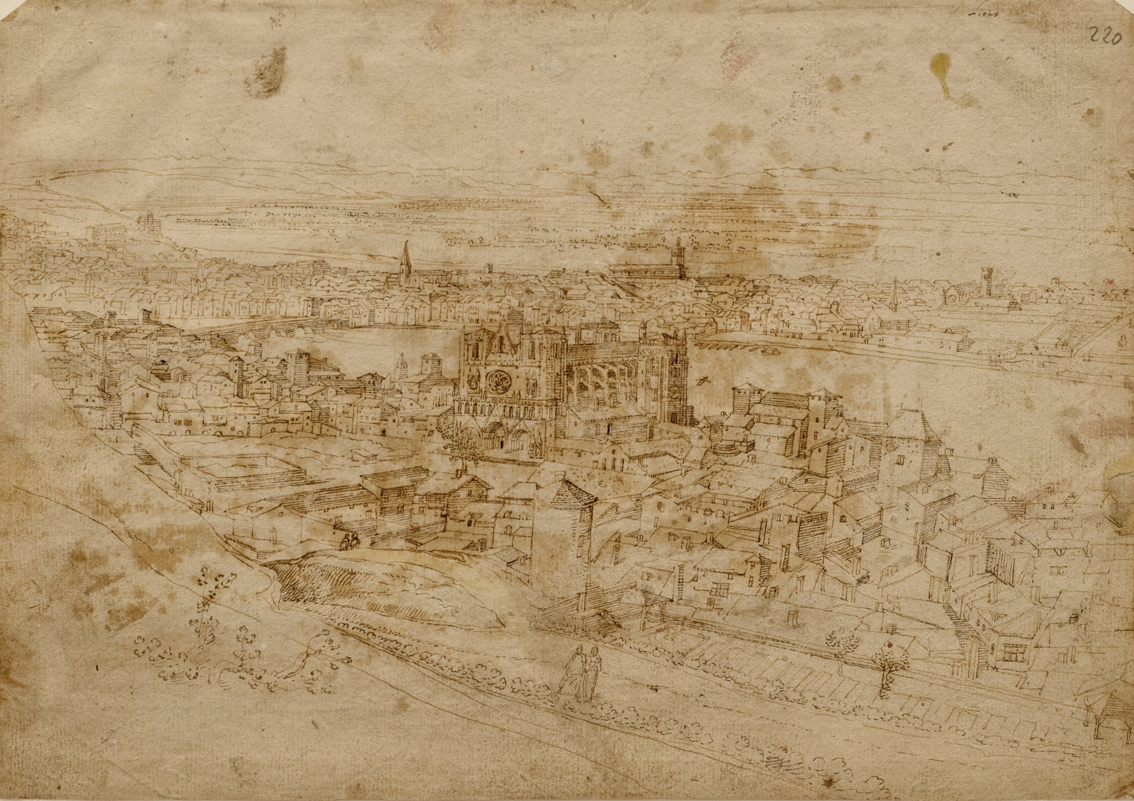 Anonyme Fabriczy [Hendrik Gijsmans (1540-1560 – 1611-1612) ? La Cathédrale Saint-Jean à Lyon vue depuis la colline de Fourvière Plume et encre brune